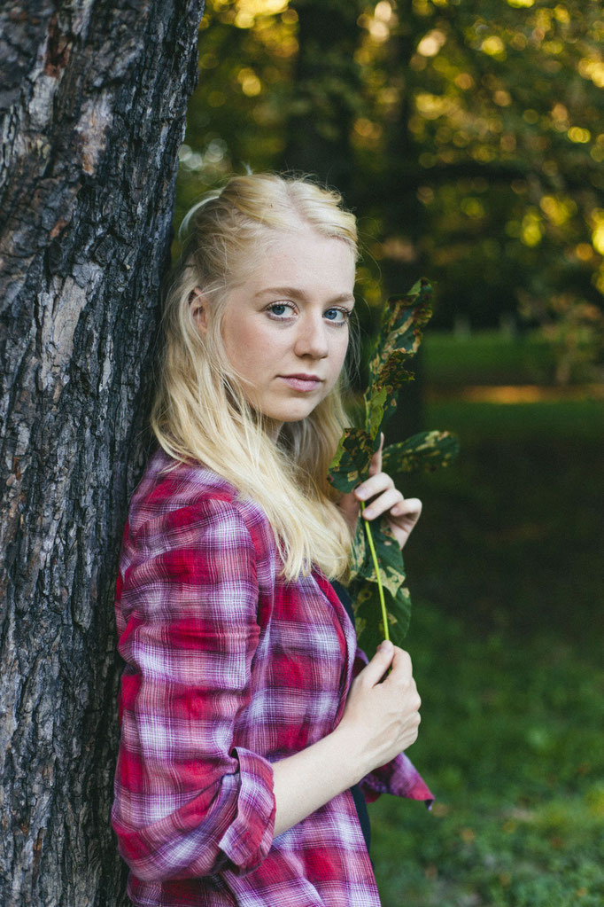 Portrait von Stefanie Darnesa, aufgenommen 2016 von Hannah Schwaiger